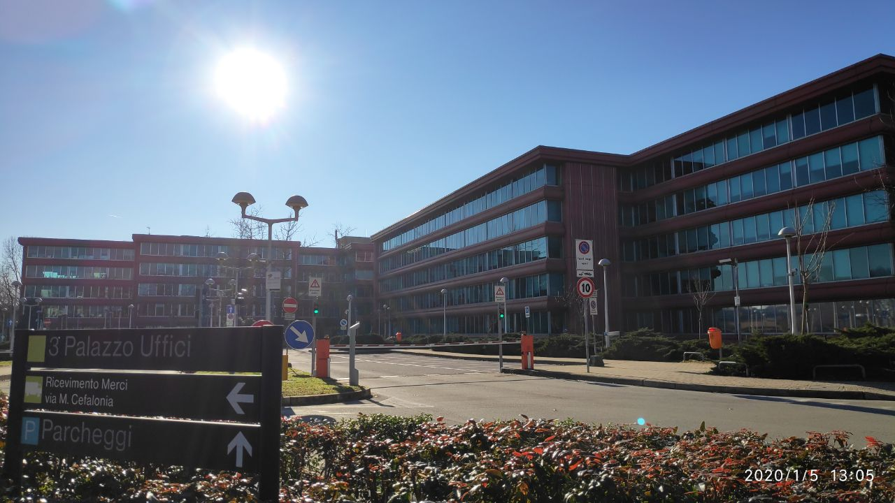 Terzo palazzo Uffici - Saipem (Gennaio 2020)